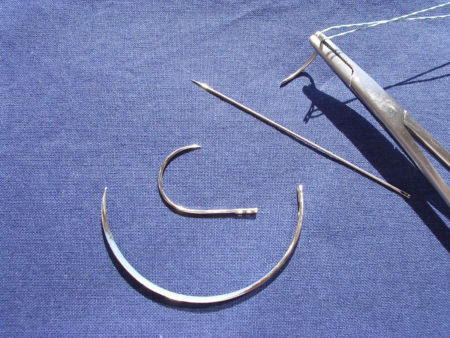 Foto scattata personalmente Si lascia in pubblico dominio Aghi di vario tipo con cruna aperta e chiusa